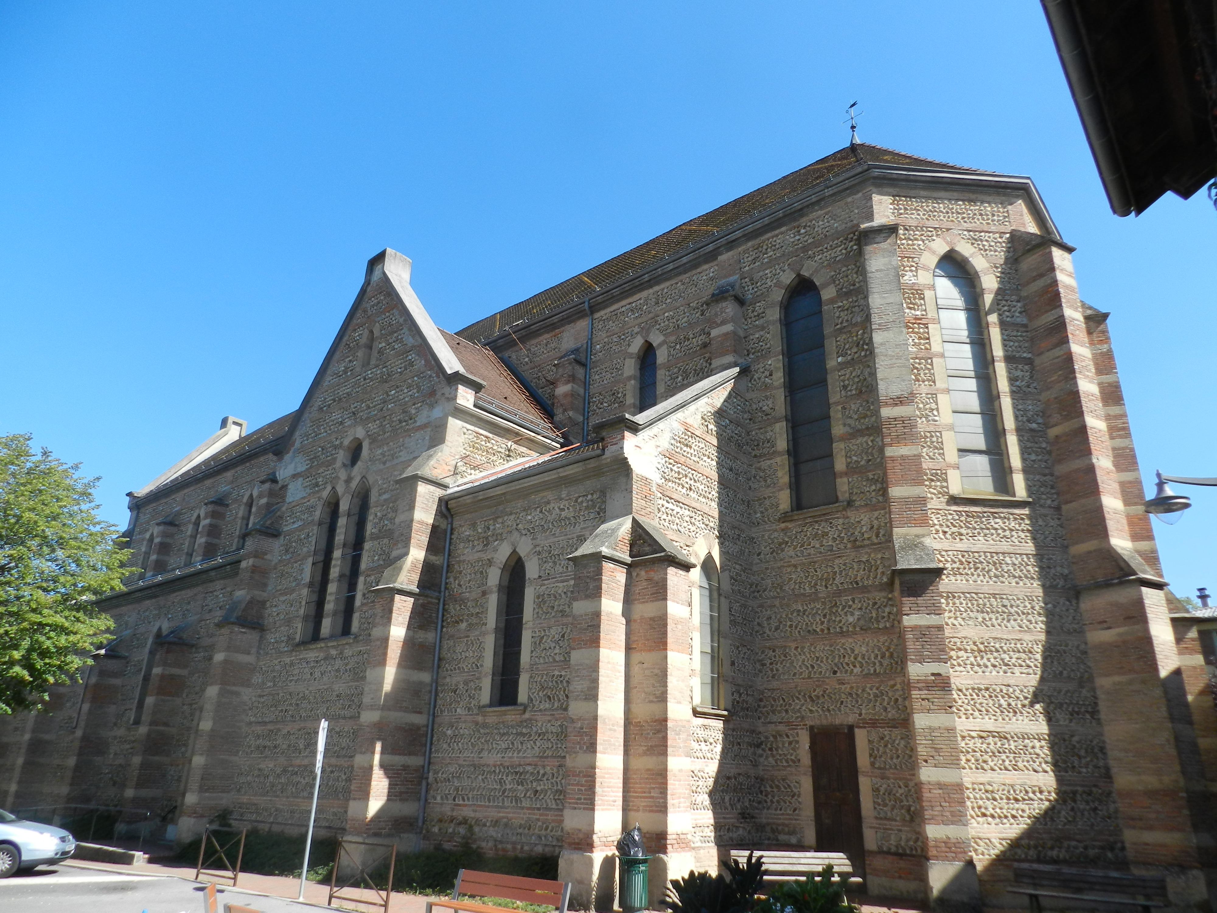 Église Saint-Étienne de Saint-Étienne-de-Saint-Geoirs, (Inscrit, 1995)